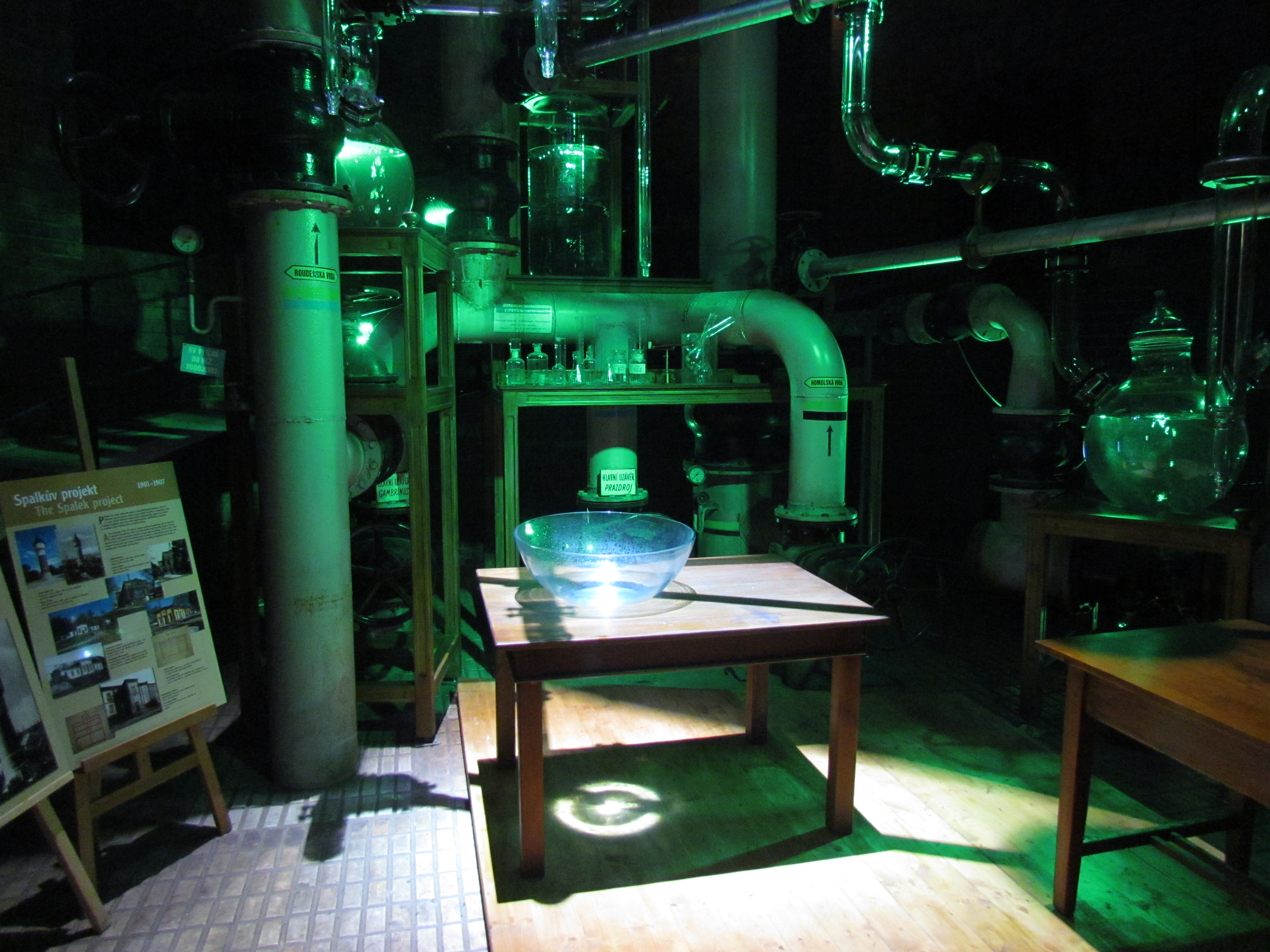 Pivovarská věž v areálu Plzeňského Prazdroje - interiér.